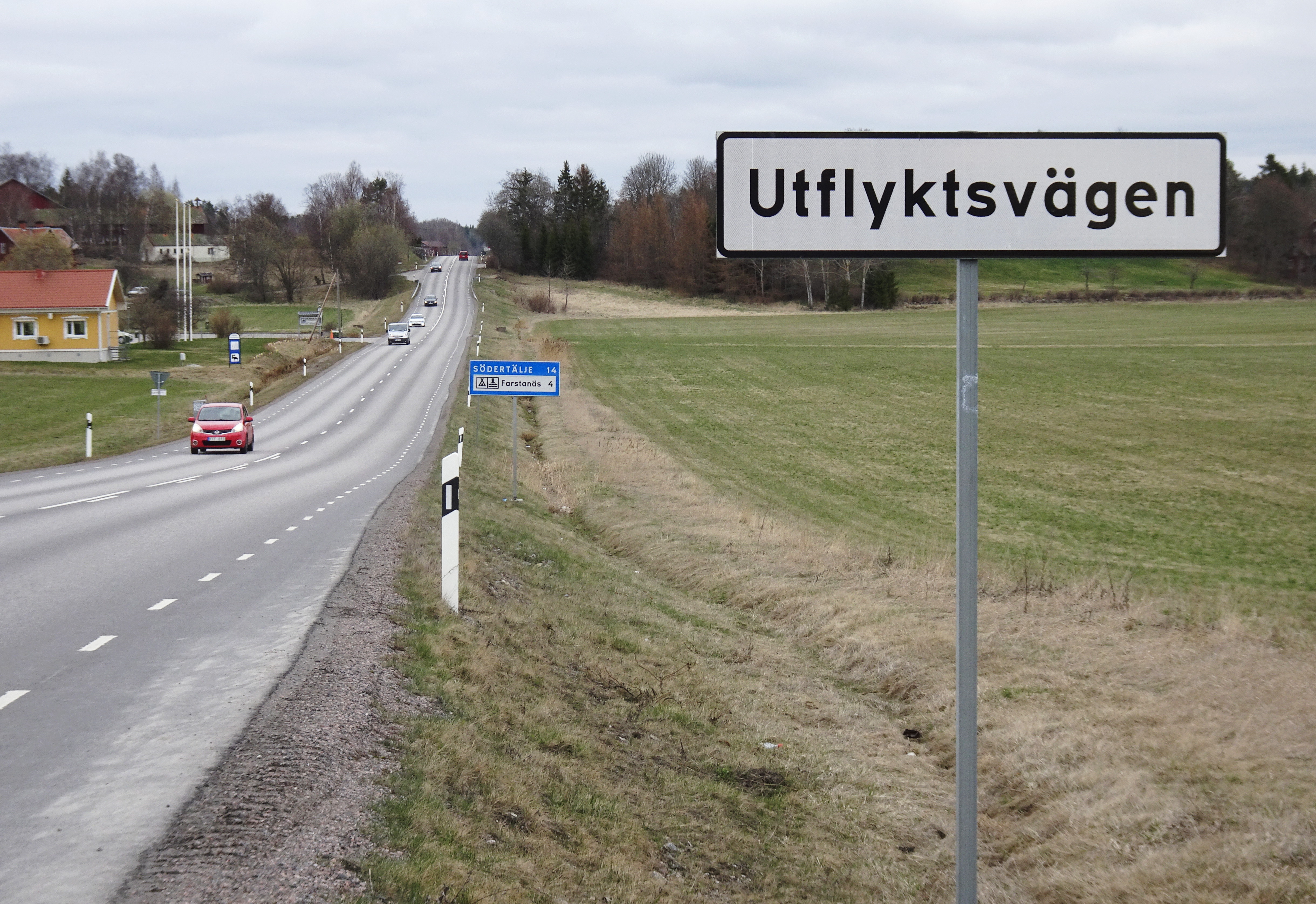 Utflyksvägen nära Farstanäs, vy mot norr (Länsväg AB 525)